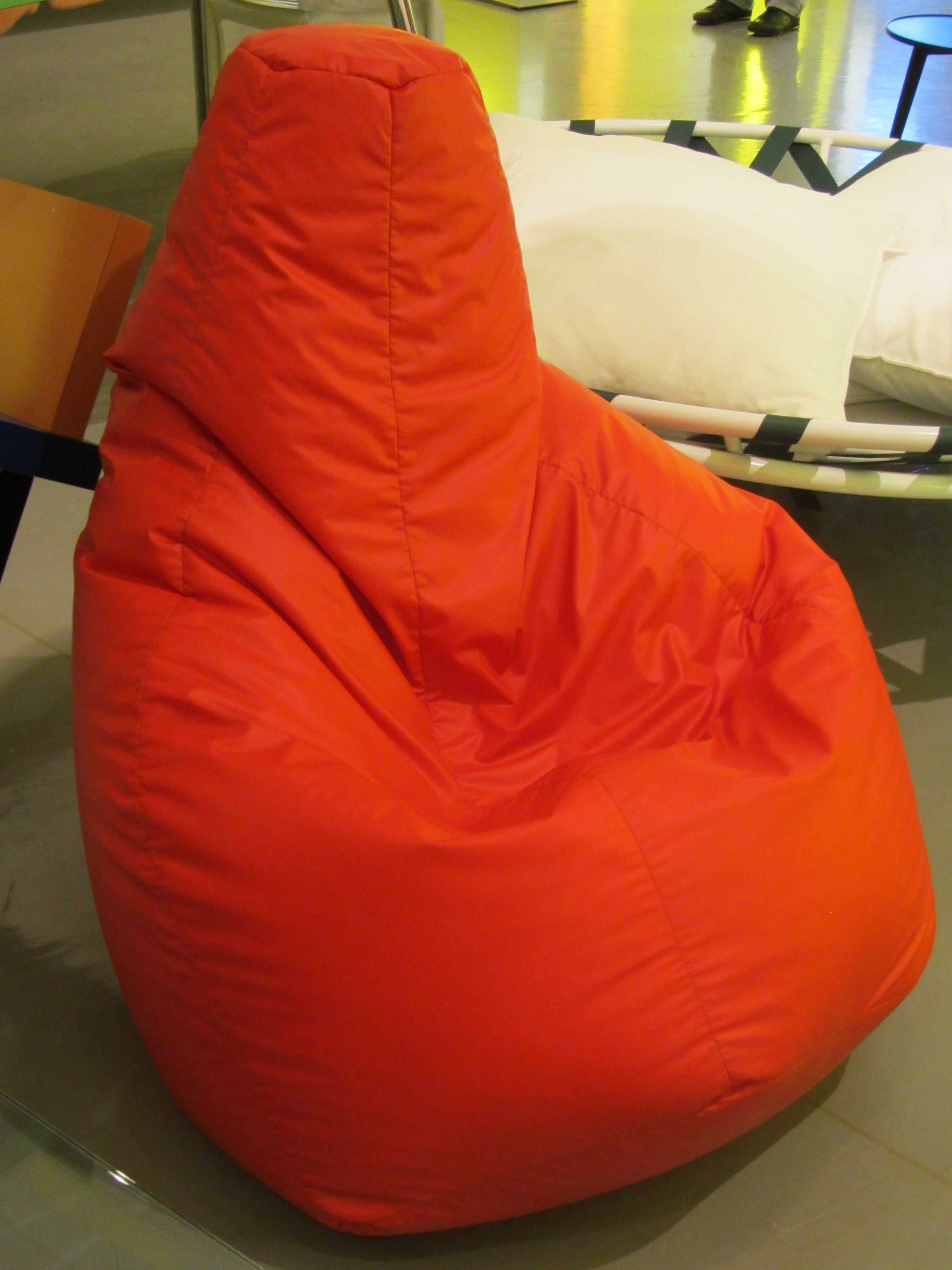 La poltrona (pouf) "Sacco" di Zanotta progettata da Gatti, Paolini, Teodoro al Triennale Design Museum durante la mostra "le fabbriche dei sogni"